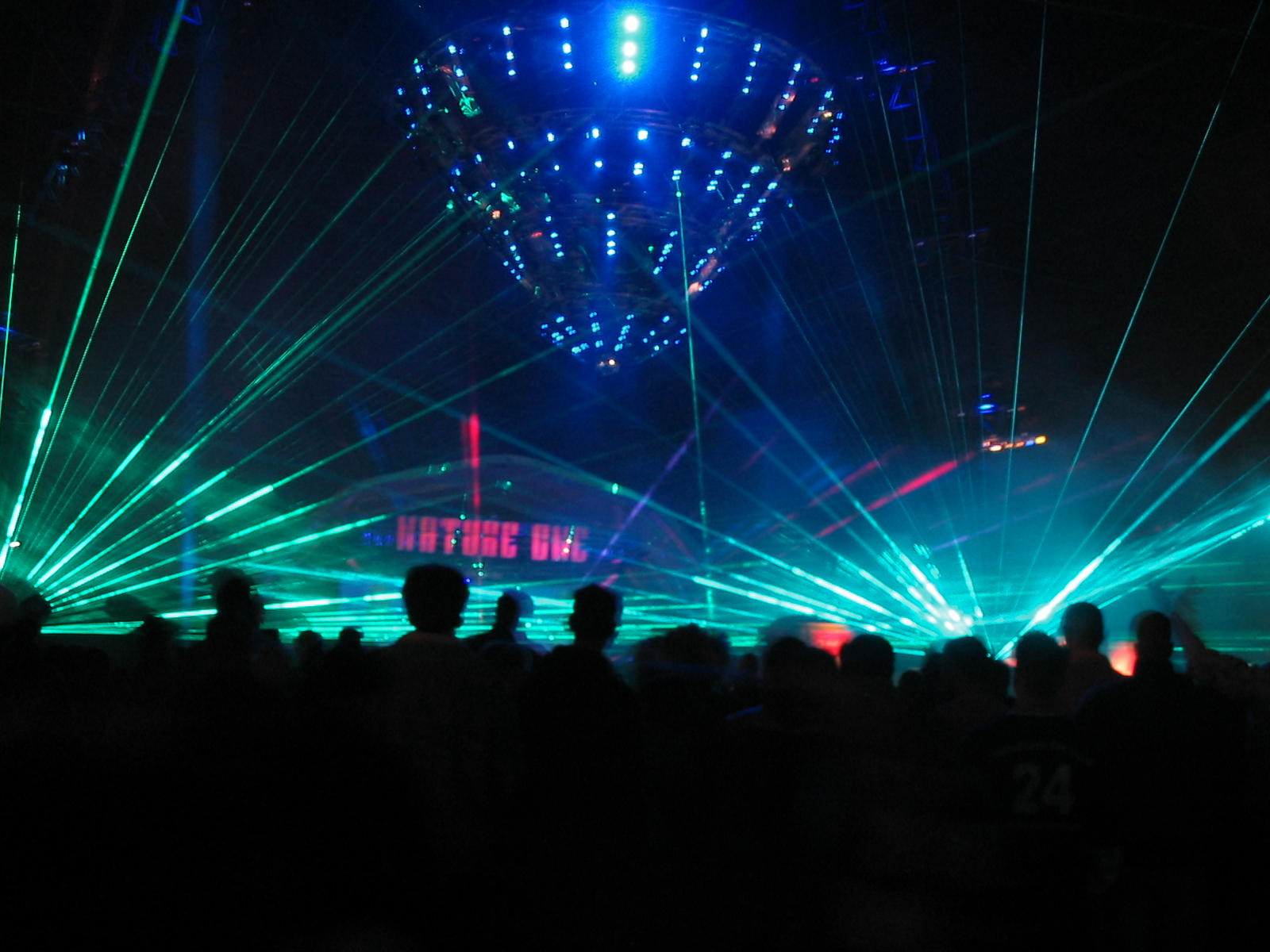 LoveRadio 2002